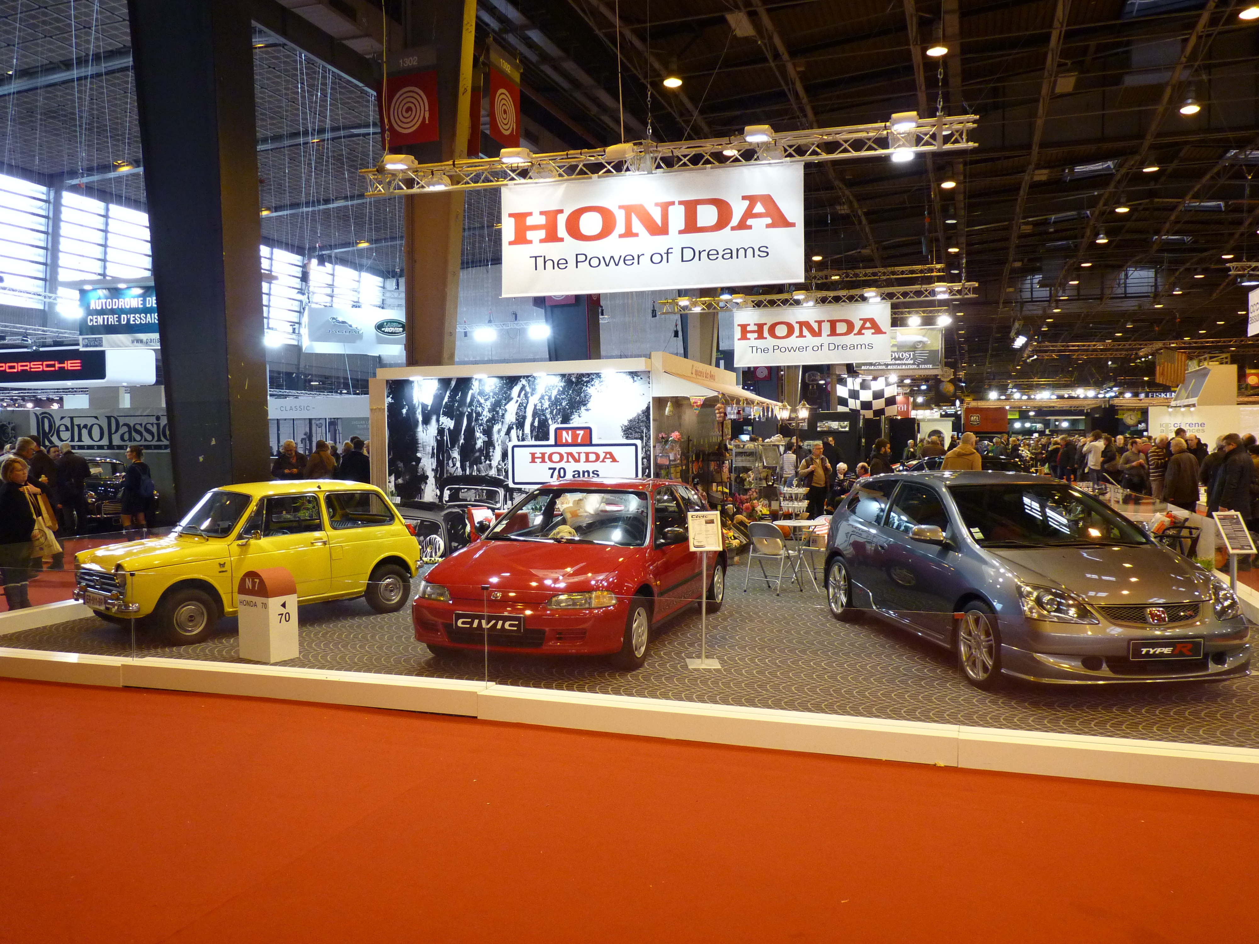 70 ans de Honda à Rétromobile 2018